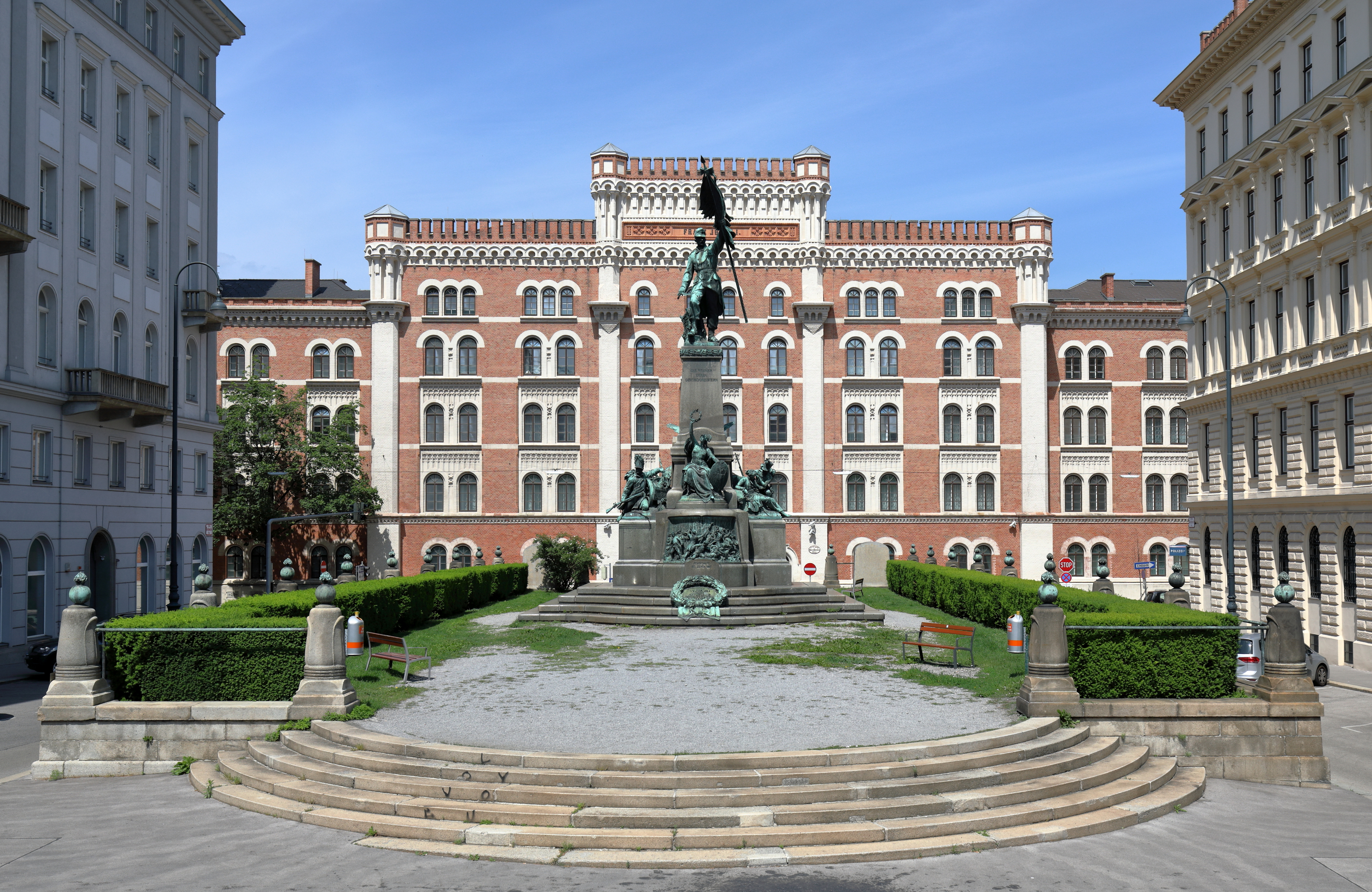 Der Deutschmeisterplatz zwischen der Maria-Theresien-Straße und dem Schottenring im 1. Wiener Gemeindebezirk Innere Stadt mit dem Deutschmeister-Denkmal und dahinter die Rossauer Kaserne. Der Platz wurde am 26. September 1876 zu Ehren des 1696 gegründeten und bis 1918 bestehenden Wiener Hausregiments k.u.k. Infanterieregiment „Hoch- und Deutschmeister“ Nr. 4 benannt. Das im Zentrum des Platzes befindliche Deutschmeister-Denkmal wurde anlässlich des 200-Jahre-Bestandsjubiläums des Regiments 1896 gestiftet und am 29. September 1906 feierliche enthüllt.